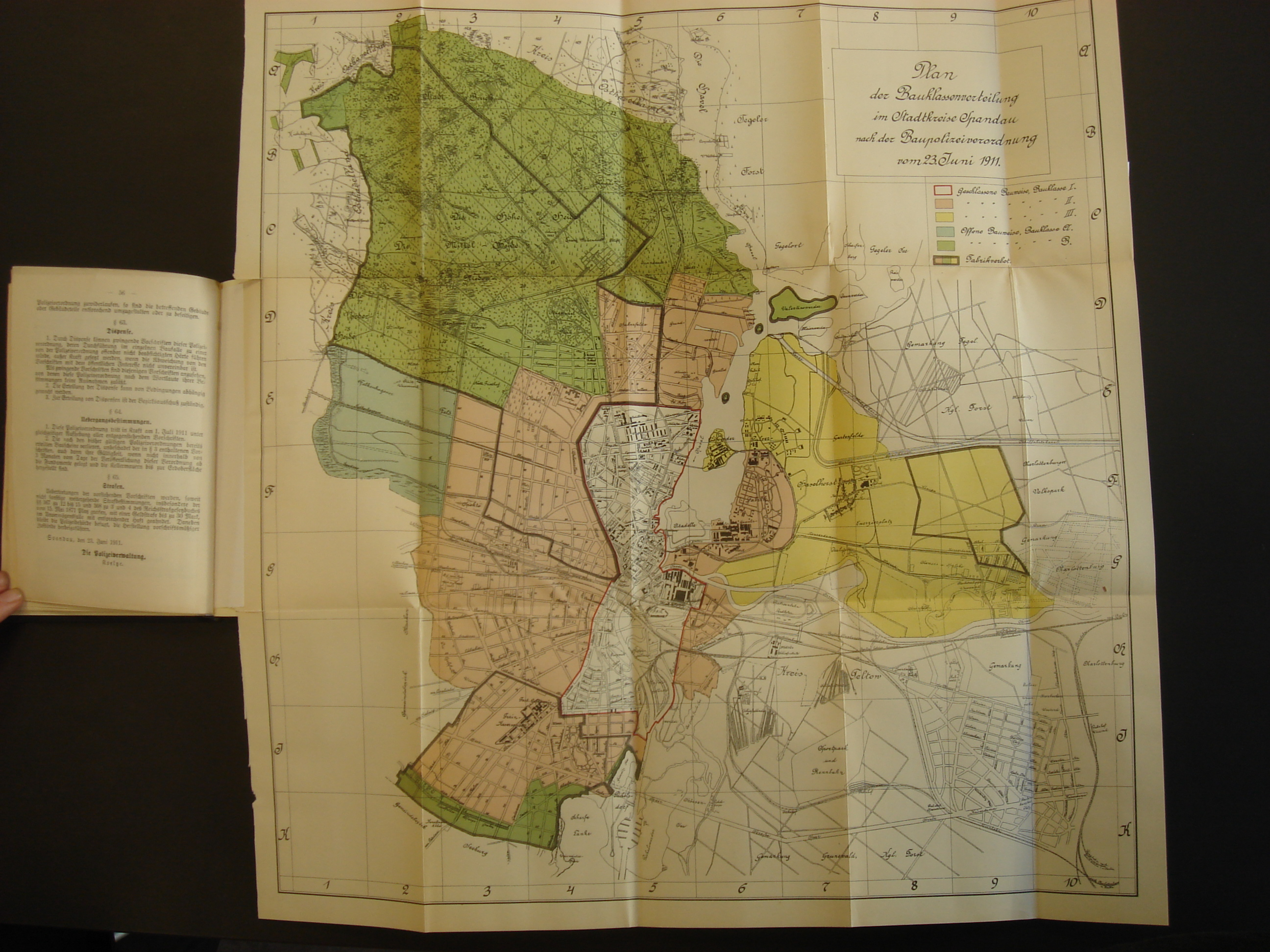 Berlin Spandau Bauklasseneinteilung 1911 Baupolizeiverordnung